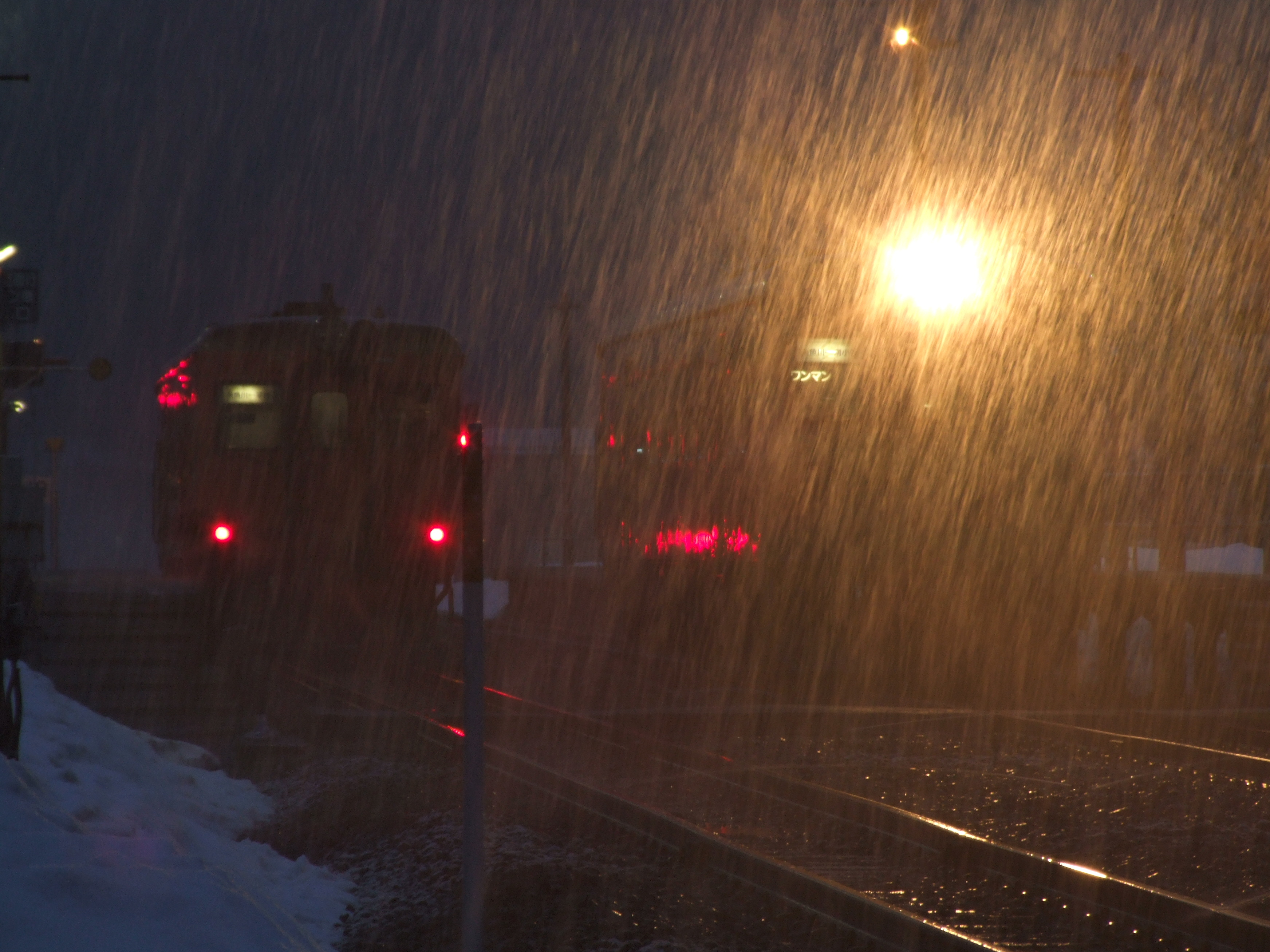 夜の雪の降る中での根知駅でのキハ52同士の交換